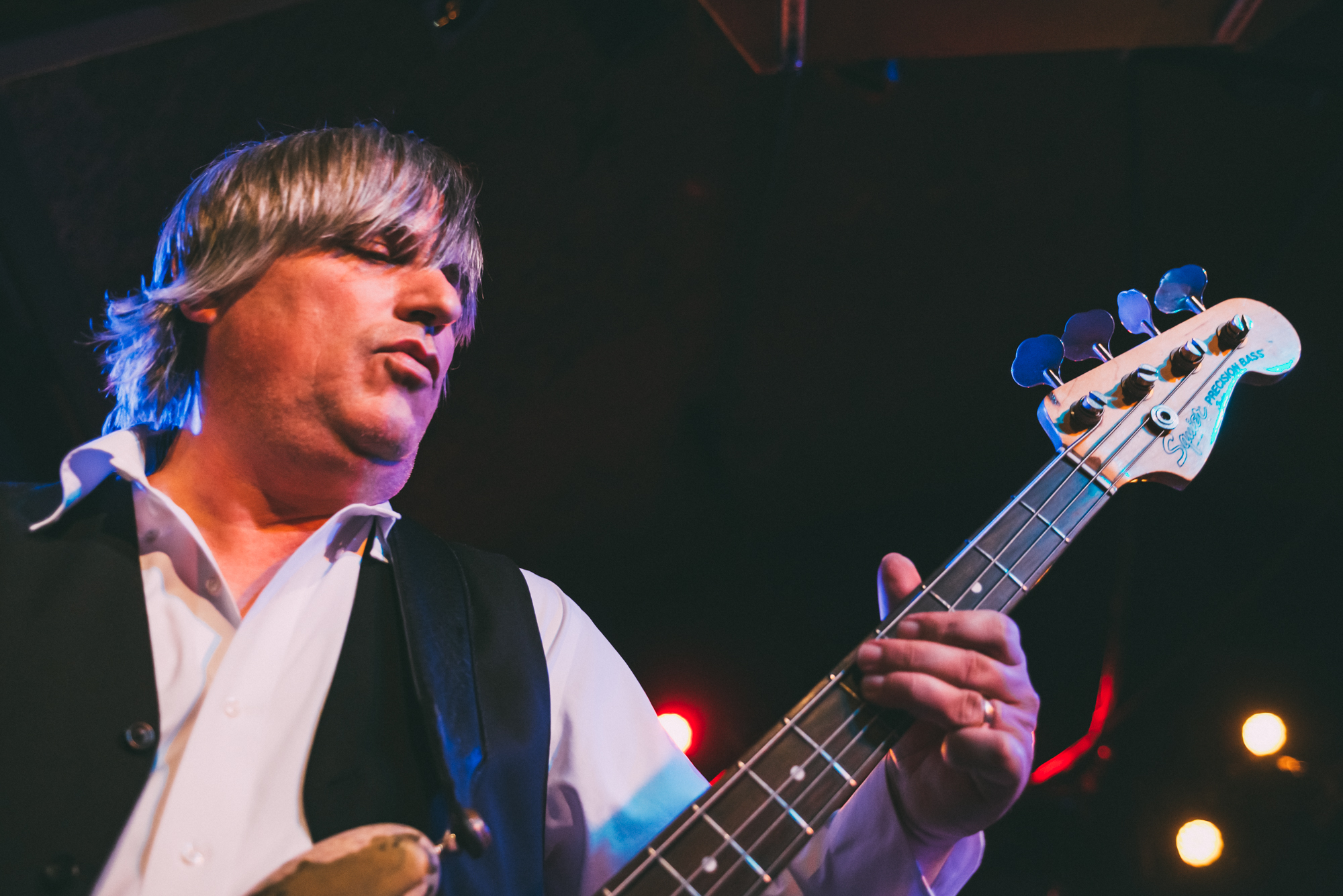 Guided by Voices tijdens een optreden in de Belly Up Tavern in San Diego (Californië)